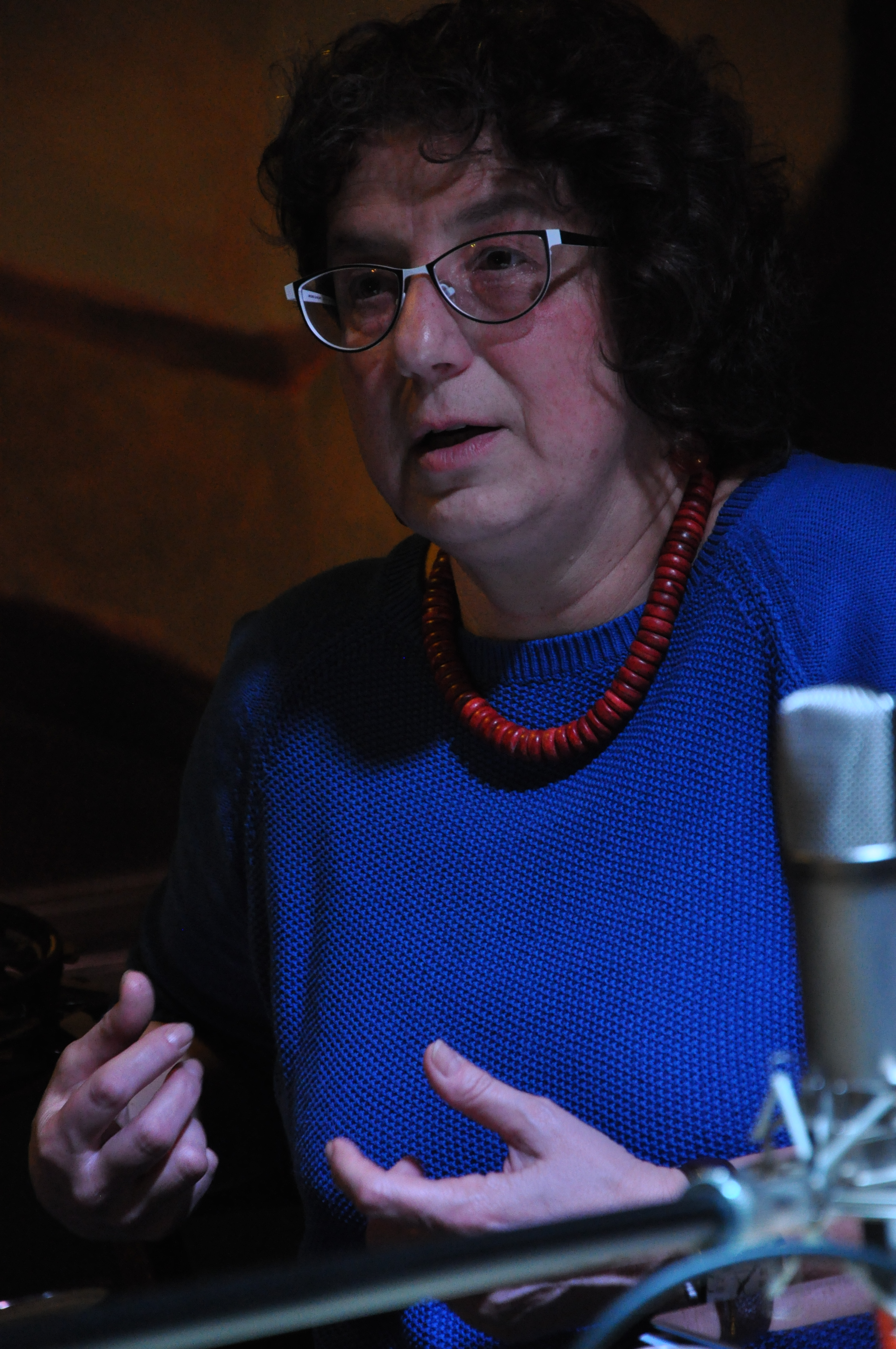 Milena Bartlová